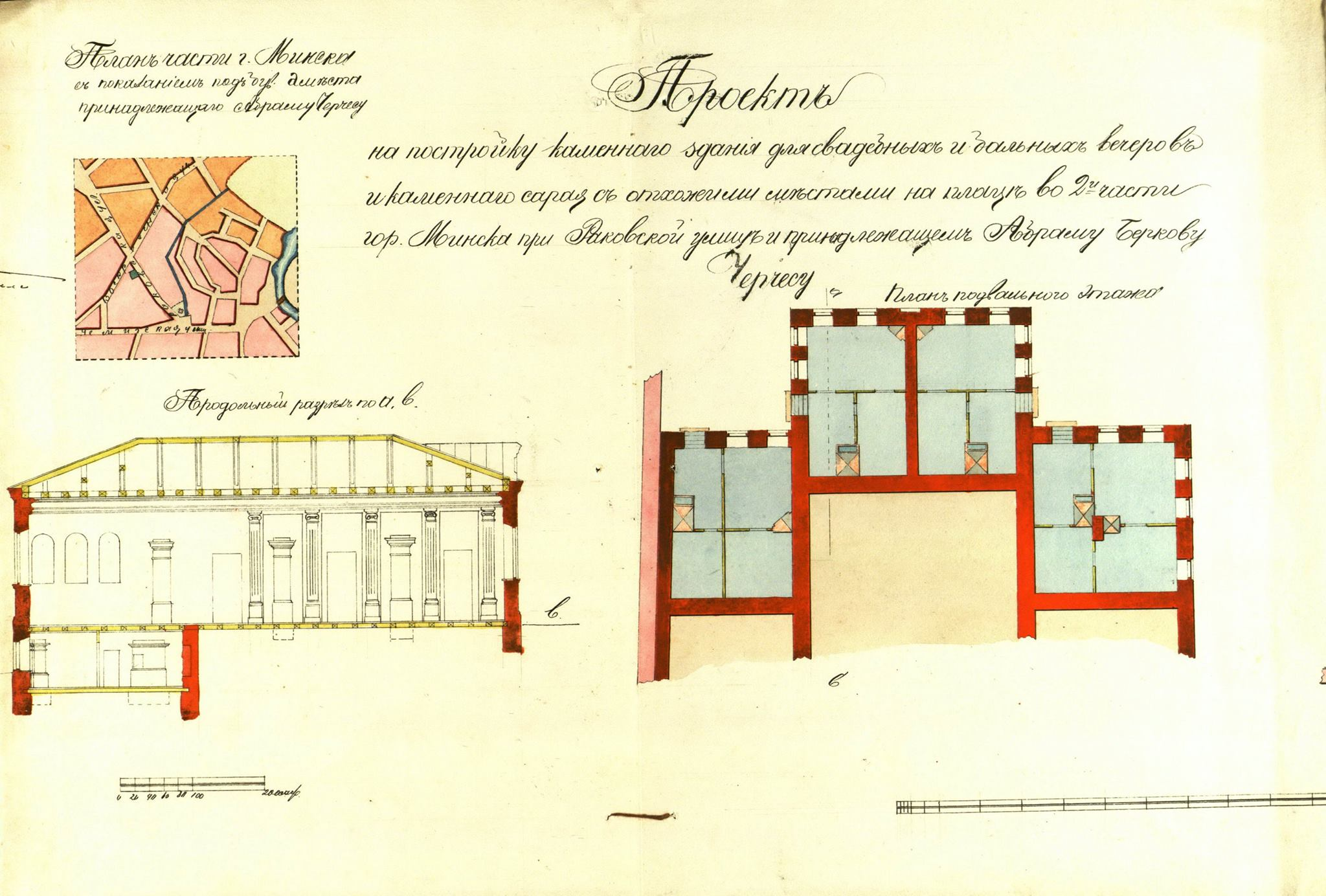 Беларуская (тарашкевіца): Менск (Miensk), Ракаўскае прадмесьце (Rakaŭskaje pradmieściе): вуліца Ракаўская (vulica Rakaŭskaja), 17. Дом для жыдоўскіх вясельляў і бальных вечарын.